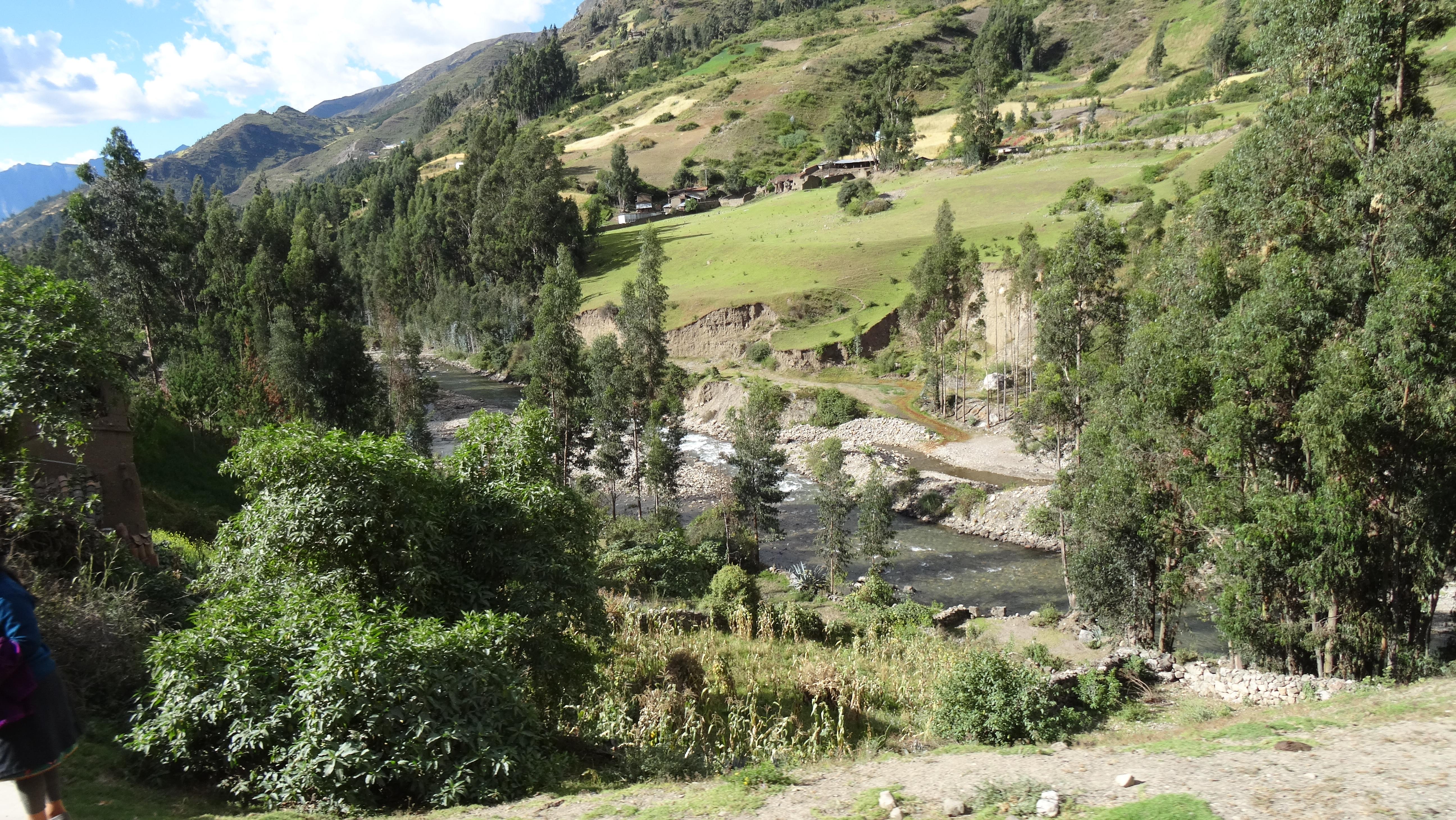 Río Mosna en las proximidades del C.P. Mariash.